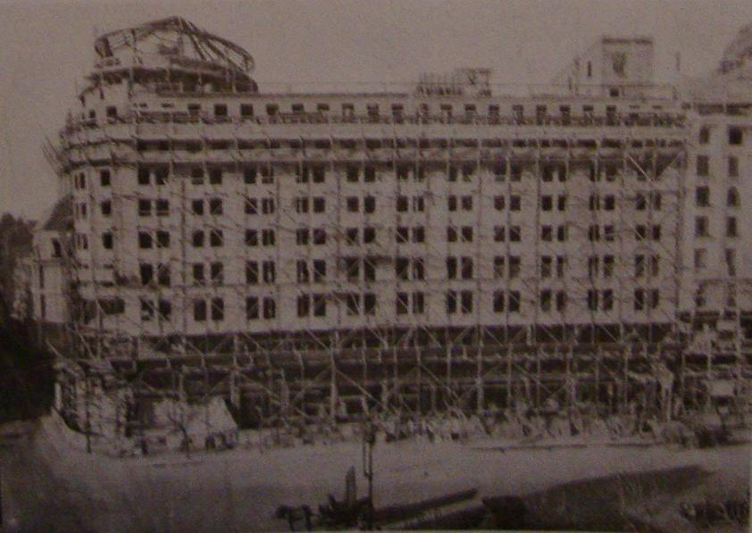 Frente sobre la Avenida Diagonal Roque Sáenz Peña del edificio en construcción para el Banco de Boston (hoy Standard Bank) en el cruce de la Avenida Roque Sáenz Peña y las calles Florida y Bartolomé Mitre. Fue inaugurado en 1924 y proyectado por los arquitectos Chambers & Thomas.